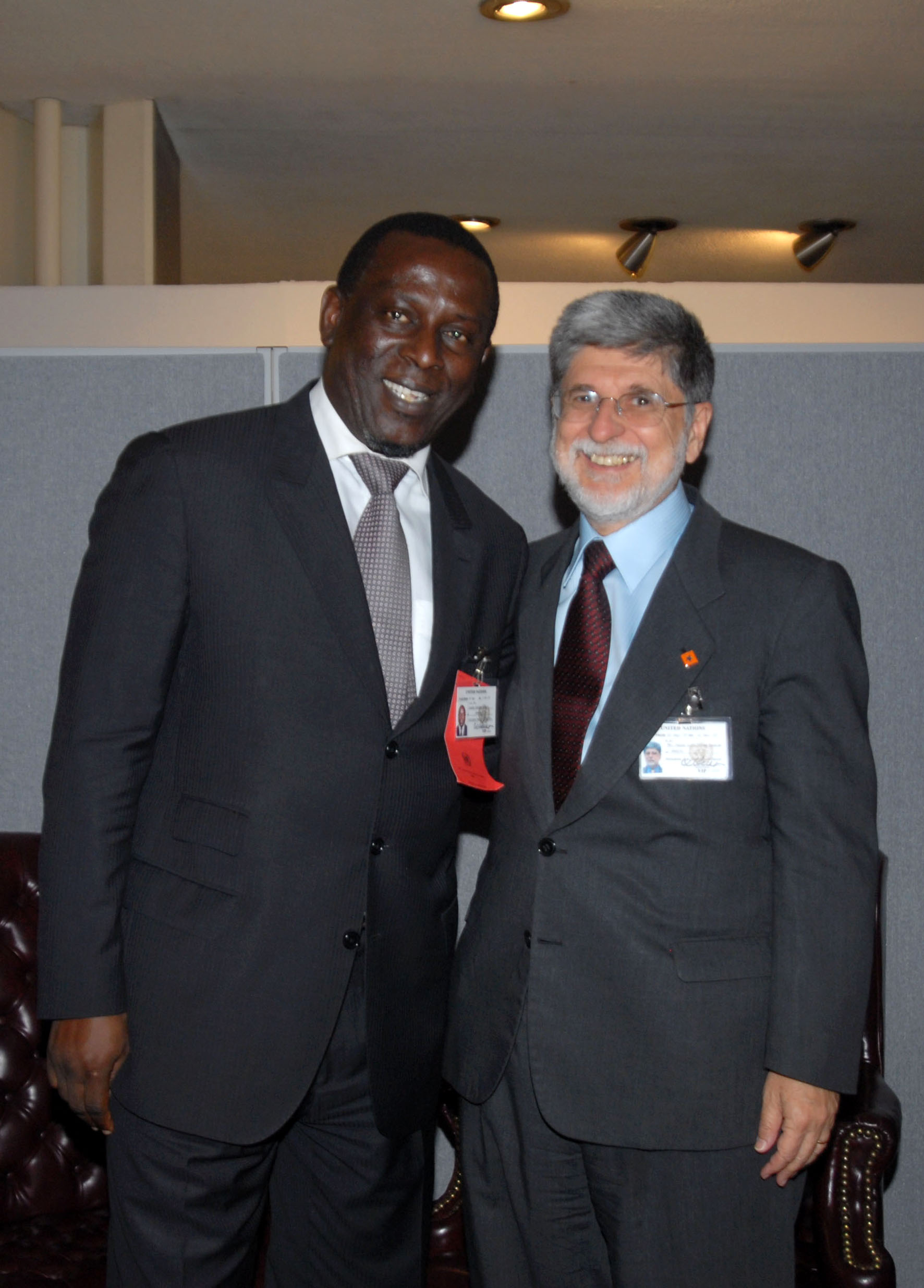 Amorim Gadio - Nova York (EUA) - O ministro das Relações Exteriores, Celso Amorim, encontra-se com o chanceler do Senegal, Cheik Gadio, na sede da ONU